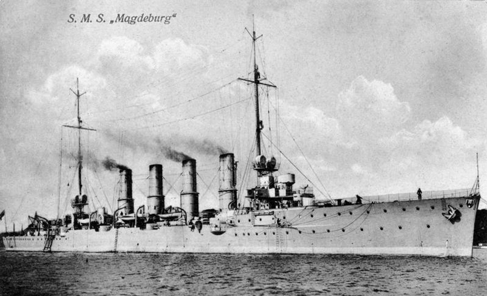 S. M. S. "Magdeburg"